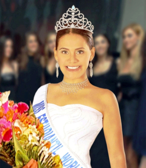 Killa Tedesqui, ganadora del Miss Estudiantil Mundo